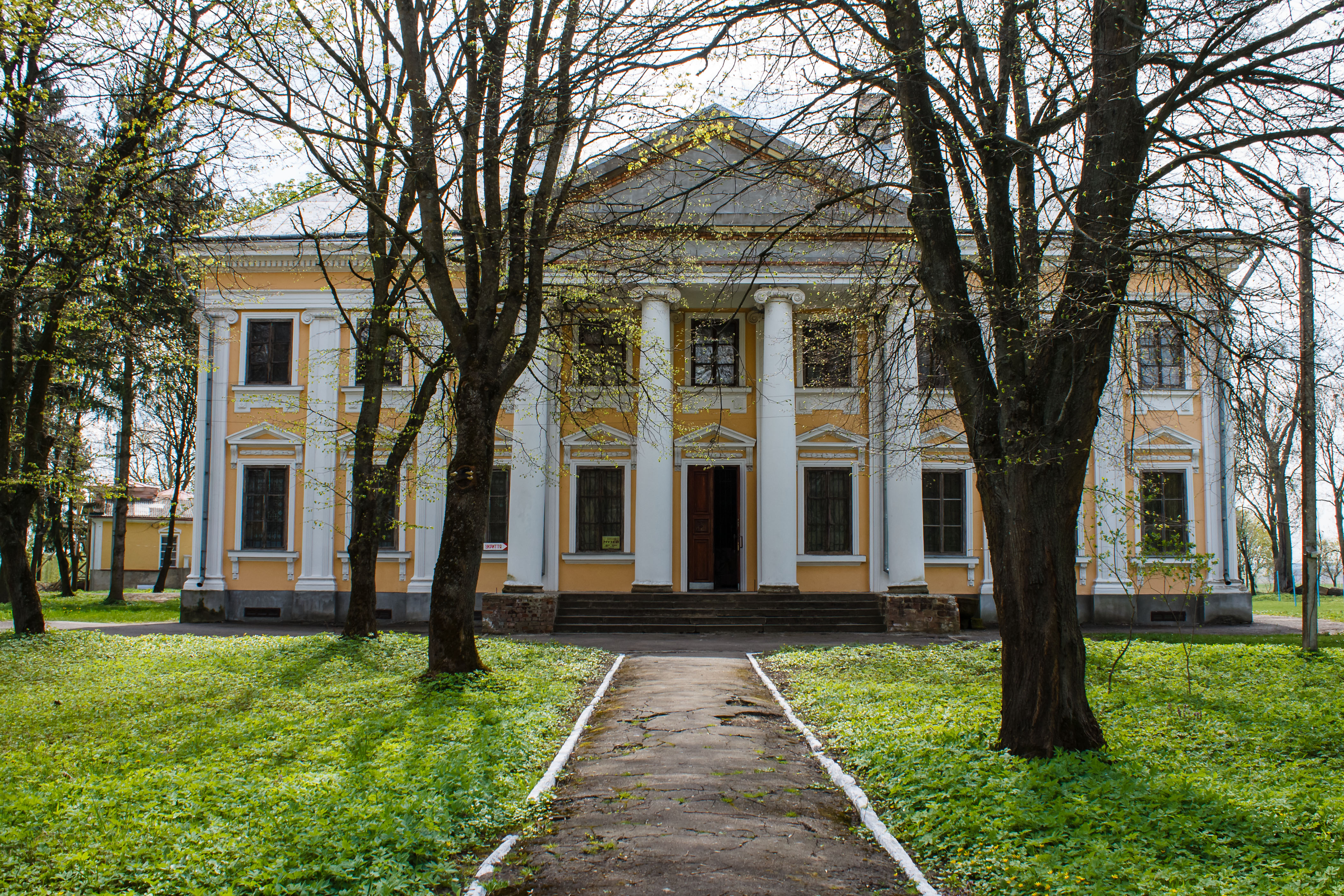 Флігель садиби Корецьких (мур.), Млинів, вул.I.Франка, 1б